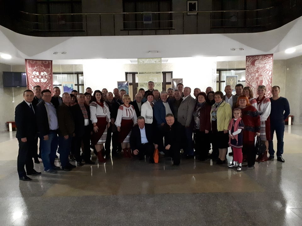 Загальні збори Недригайлівського земляцтва в Сумах до Дня юриста (3.10.2019)